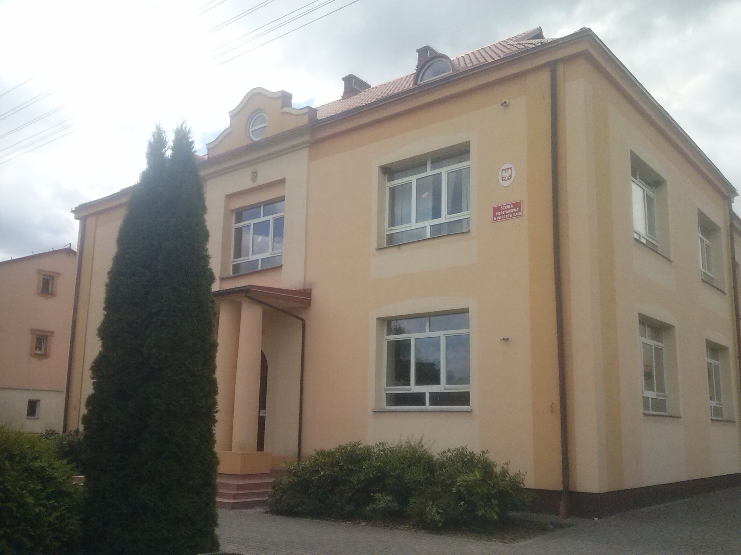 Szkoła podstawowa w Piskorowicach